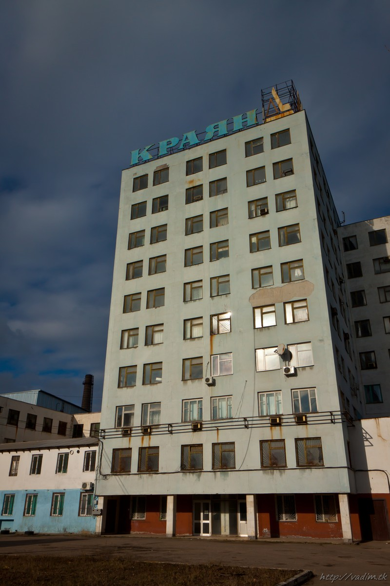 Заводоуправление "Краян"